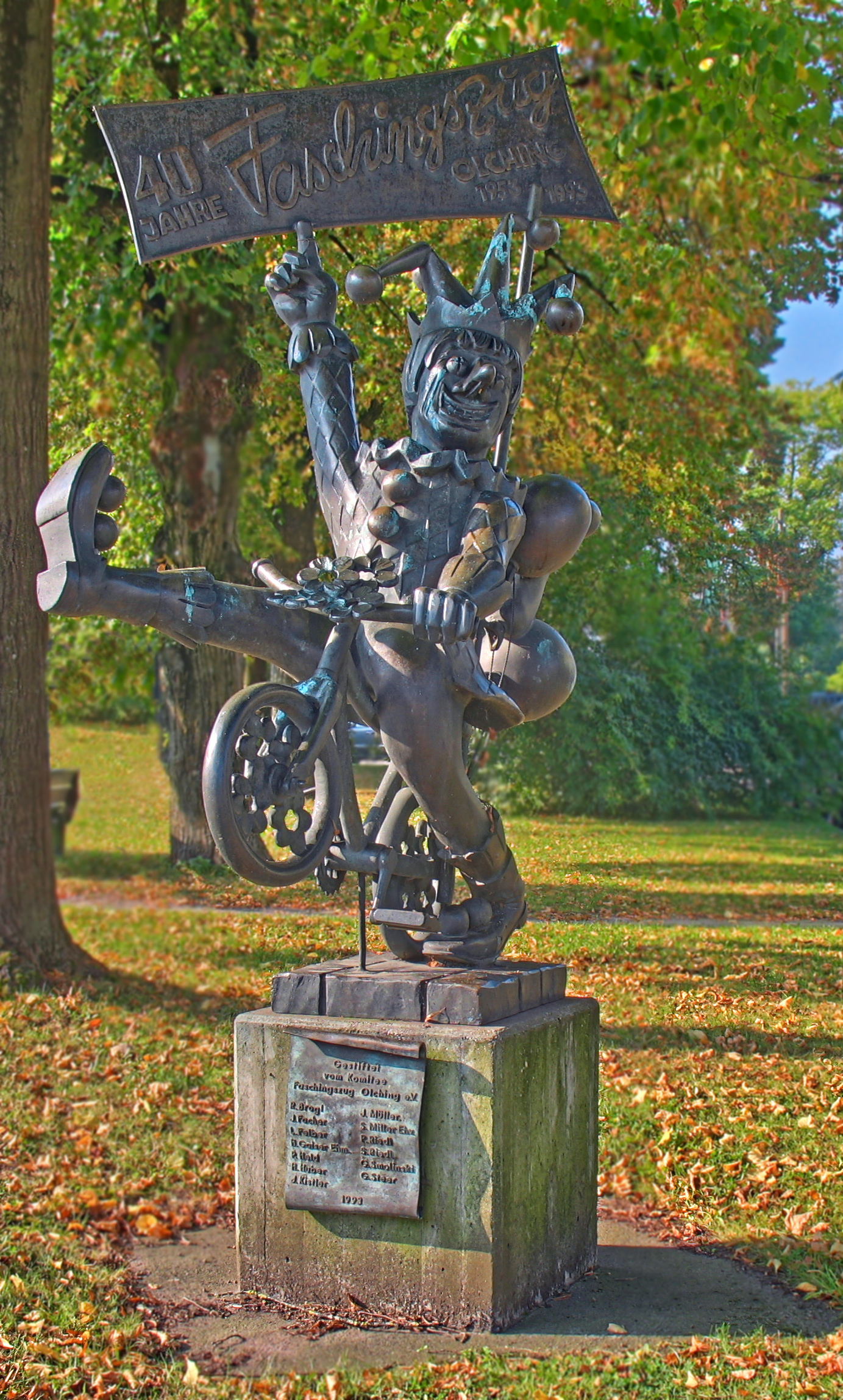 Gedenkfigur 40 Jahre Olchinger Faschingsumzug 1953-1993